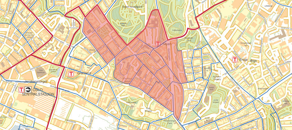 Kart over de bebygde delene av Tøyen beliggende i Bydel Gamle Oslo.